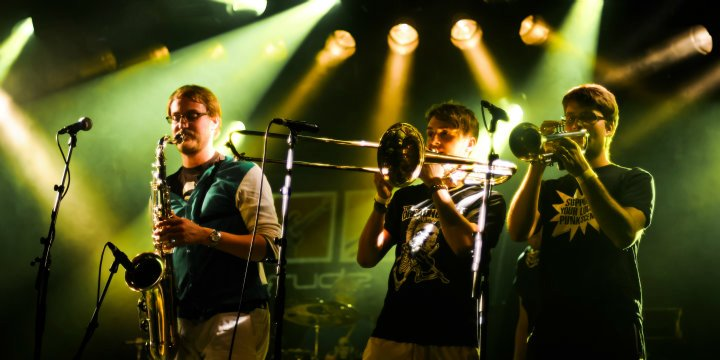 Rude Tins Bläsersektion